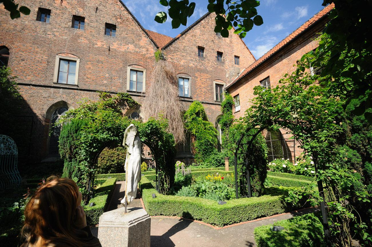 Dziedziniec muzeum czyli dawnego klasztoru Bernardynów.